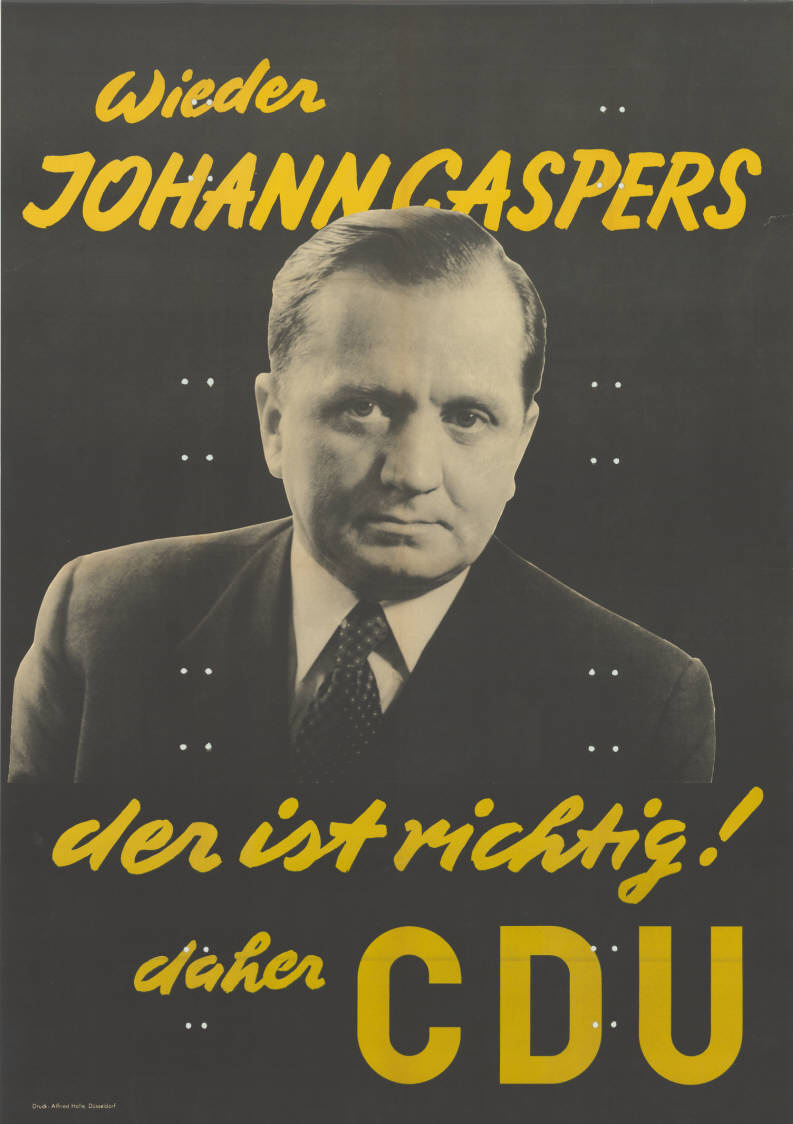 Wieder Johann Caspers der ist richtig! daher CDU Abbildung: Porträtfoto Plakatart: Kandidaten-/Personenplakat mit Porträt Drucker_Druckart_Druckort: Alfried Holle, Düsseldorf Objekt-Signatur: 10-031 : 841 Bestand: CDU-Plakate (10-031) GliederungBestand10-18: Personenplakate Lizenz: KAS/ACDP 10-031 : 841 CC-BY-SA 3.0 DE